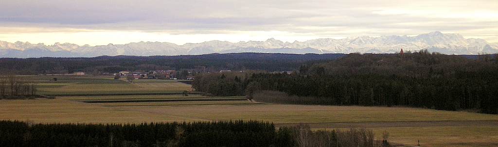 Schloss Kaltenberg bei Geltendorf (Landkreis Landsberg am Lech, Oberbayern). Der Burgberg (rechts) mit dem Wettersteingebirge. Eigene Aufnahme, Feb. 2008 / Kaltenberg castle near Geltendorf (Landkreis Landsberg am Lech, Upper Bavaria, Germany). The castle hill (right) with the Wetterstein Alps. Own photo, Feb. 2008